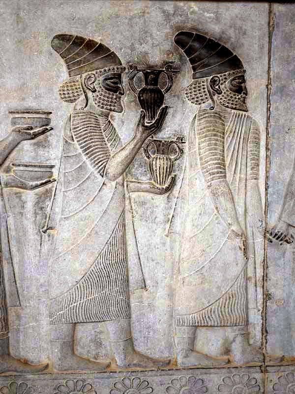 bas reliefs persepolis